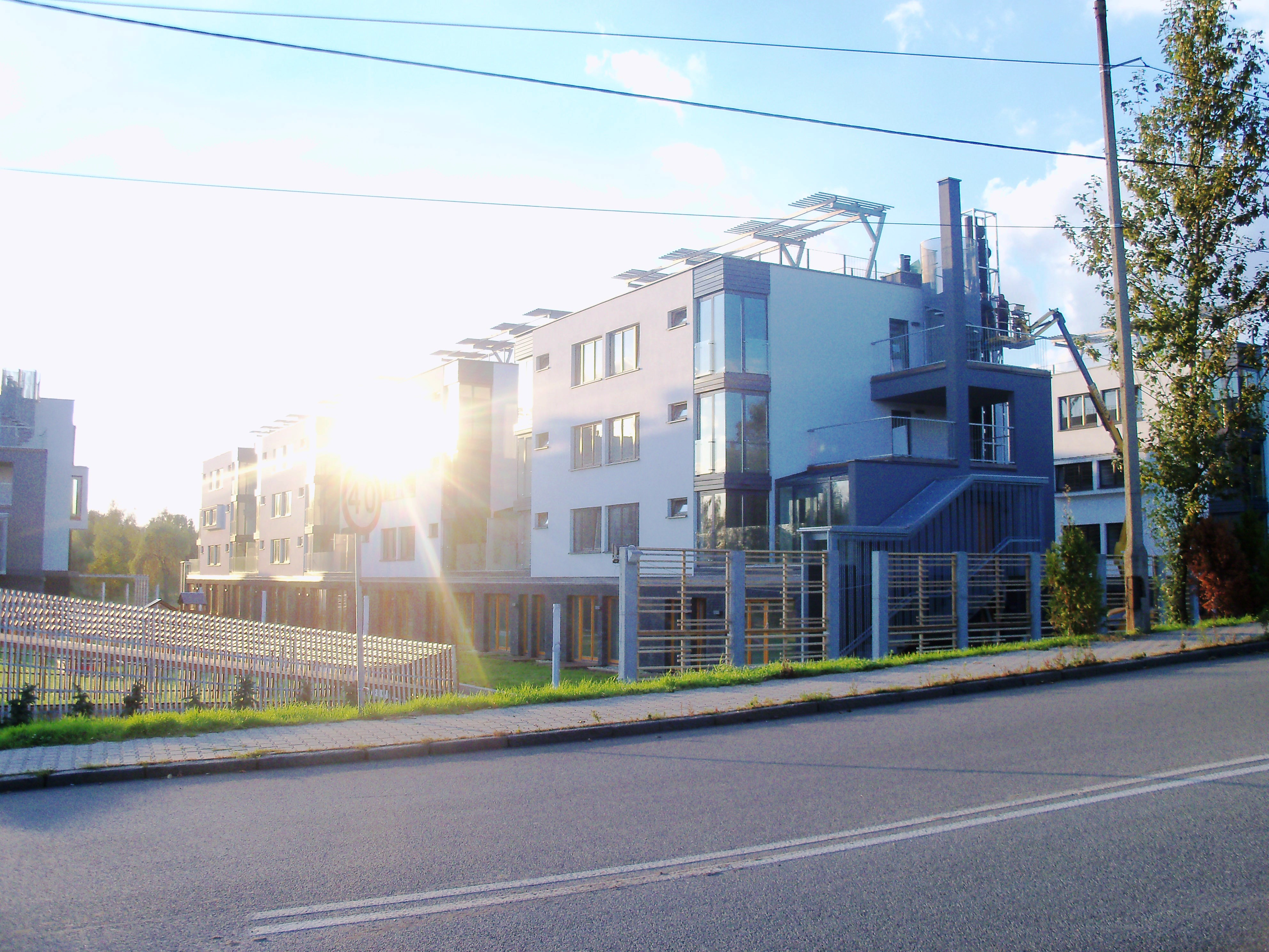 osiedle pomiędzy ul. Książęcą i ul. Piotrowicką w Katowicach - widok z ul. Piotrowickej